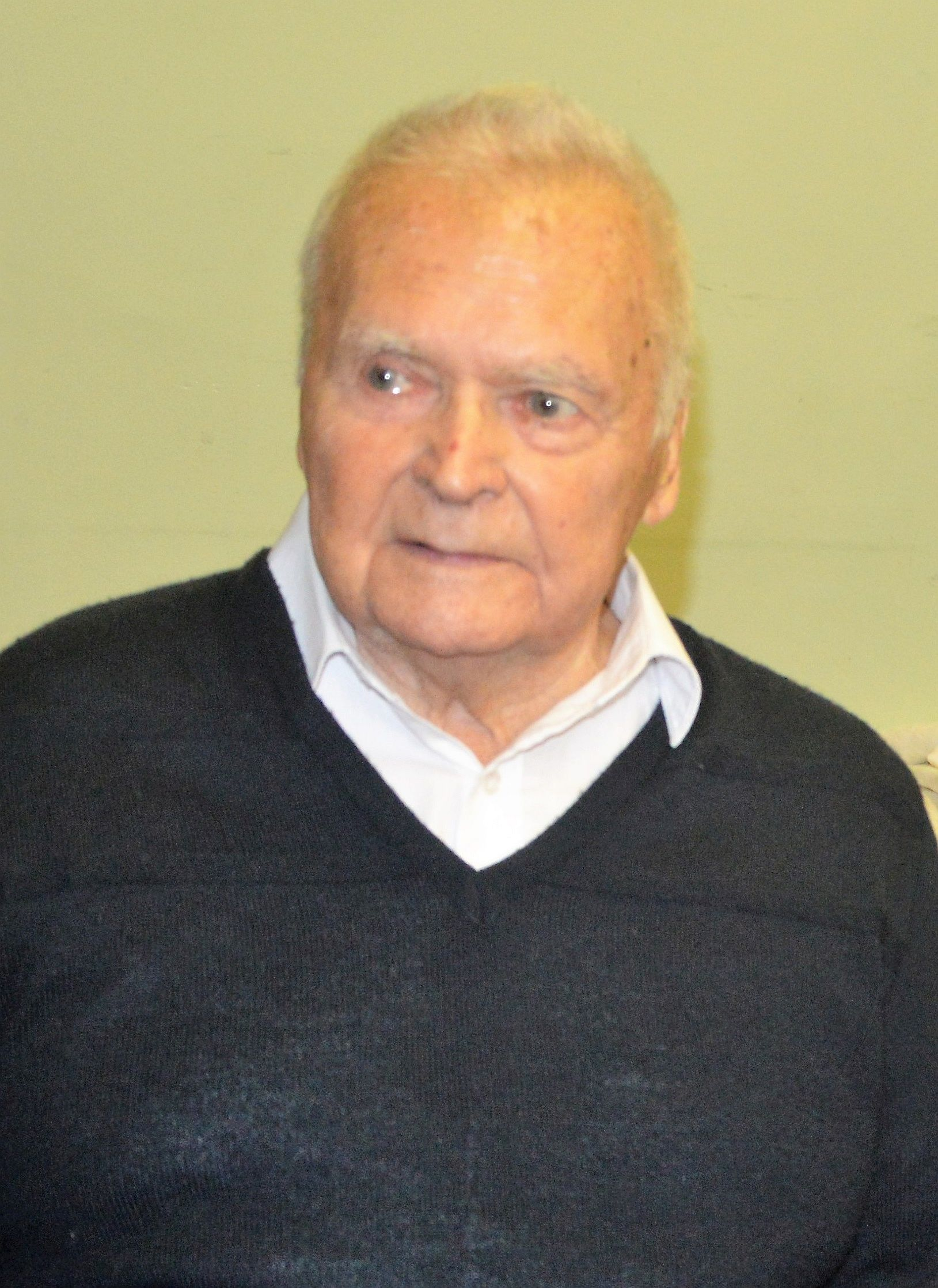 Szondy István olimpiai bajnok magyar öttusázó, vívó, sportlovagló, edző